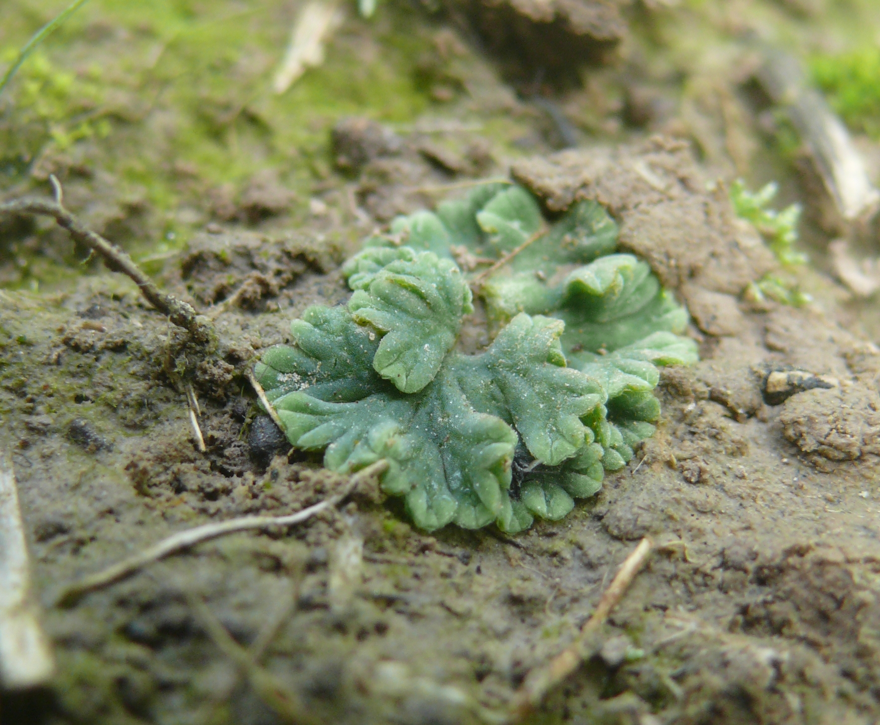 Riccia sorocarpaHohenloher Ebene, Deutschland